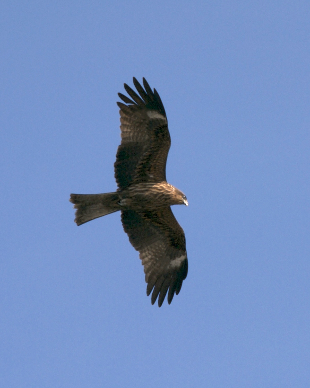 トビ Black Kite Milvus migrans lineatus, Enoshima, Japan